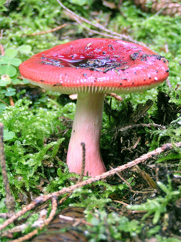 Russula sanguinea - Russulaceae